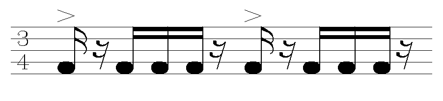 Batuku rhythm model